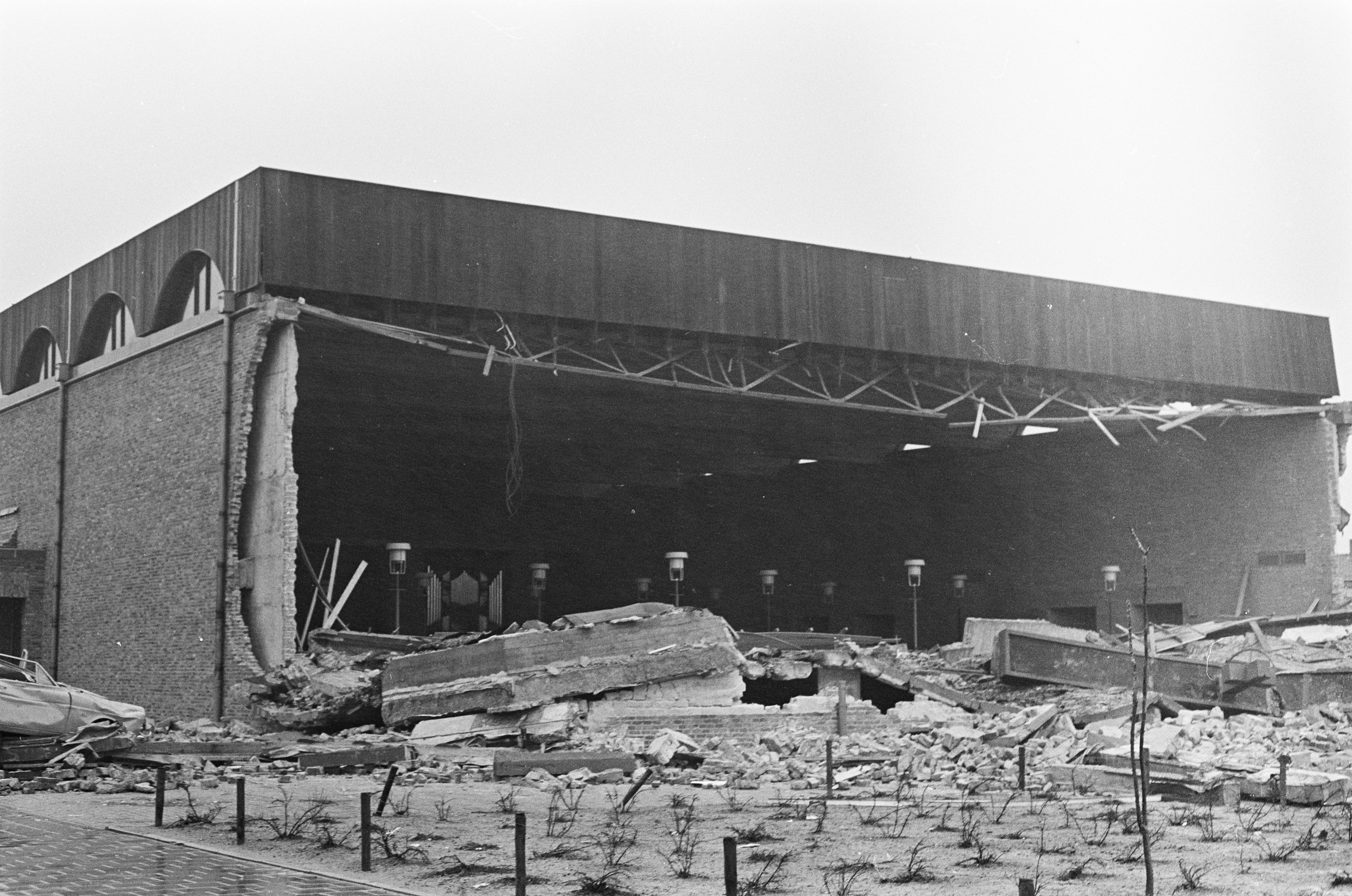 Collectie / Archief : Fotocollectie Anefo Reportage / Serie : [ onbekend ] Beschrijving : St. Lucaskerk in Den Bosch stortte gedeeltelijk in, de voorzijde van de kerk ingestort Datum : 13 januari 1968 Locatie : Den Bosch Trefwoorden : kerken Fotograaf : Nijs, Jac. de / Anefo Auteursrechthebbende : Nationaal Archief Materiaalsoort : Negatief (zwart/wit) Nummer archiefinventaris : bekijk toegang 2.24.01.05 Bestanddeelnummer : 920-9870